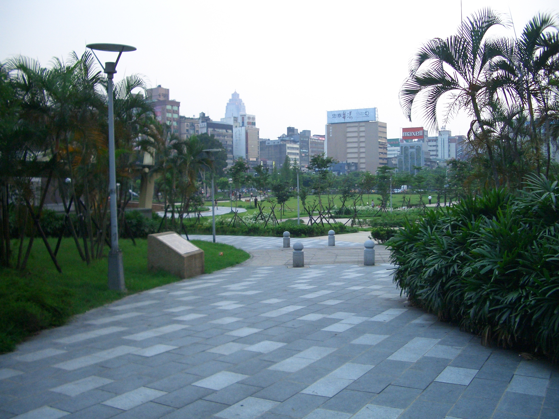 中華民國台灣台北市林森公園入口